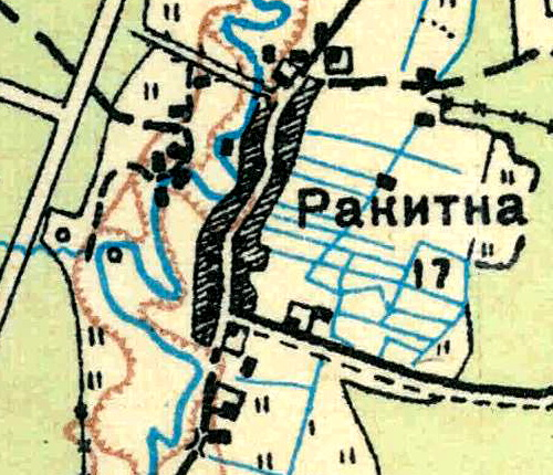 Топографическая карта Ленинградской области, квадрат О-36-25-Б-г (Озерешна), деревня Ракитино